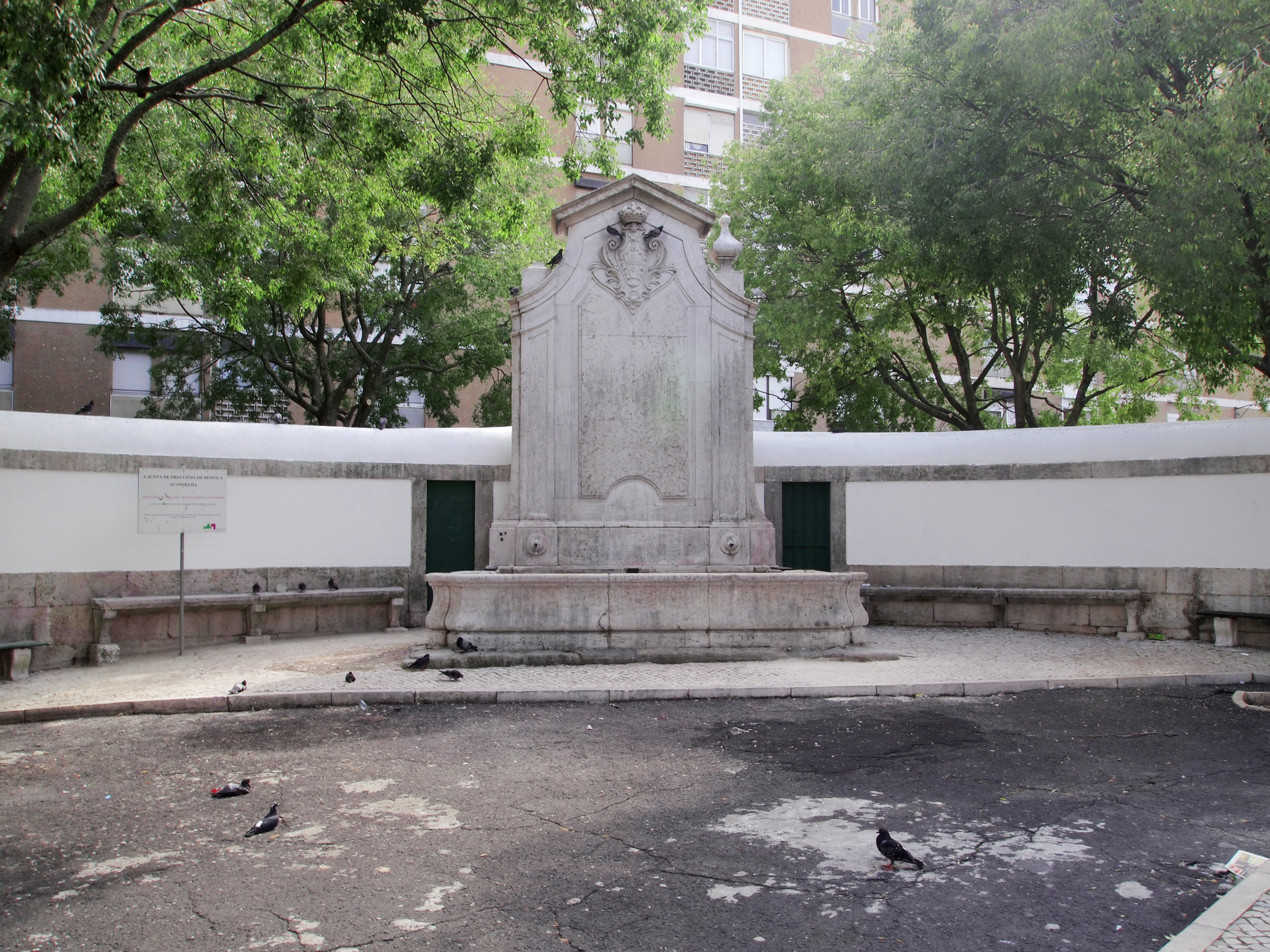 Chafariz de Benfica limpo e pintado em Agosto de 2011